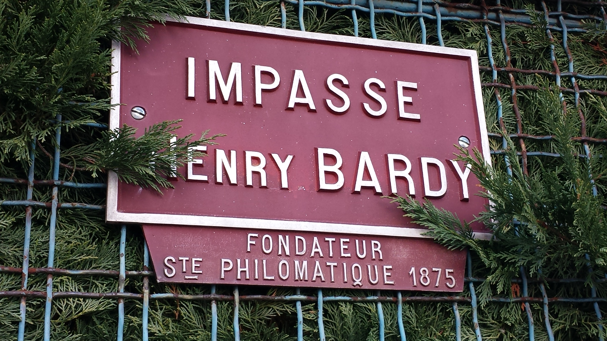 Henry Bardy a fondé la Société philomatique vosgienne en 1875.